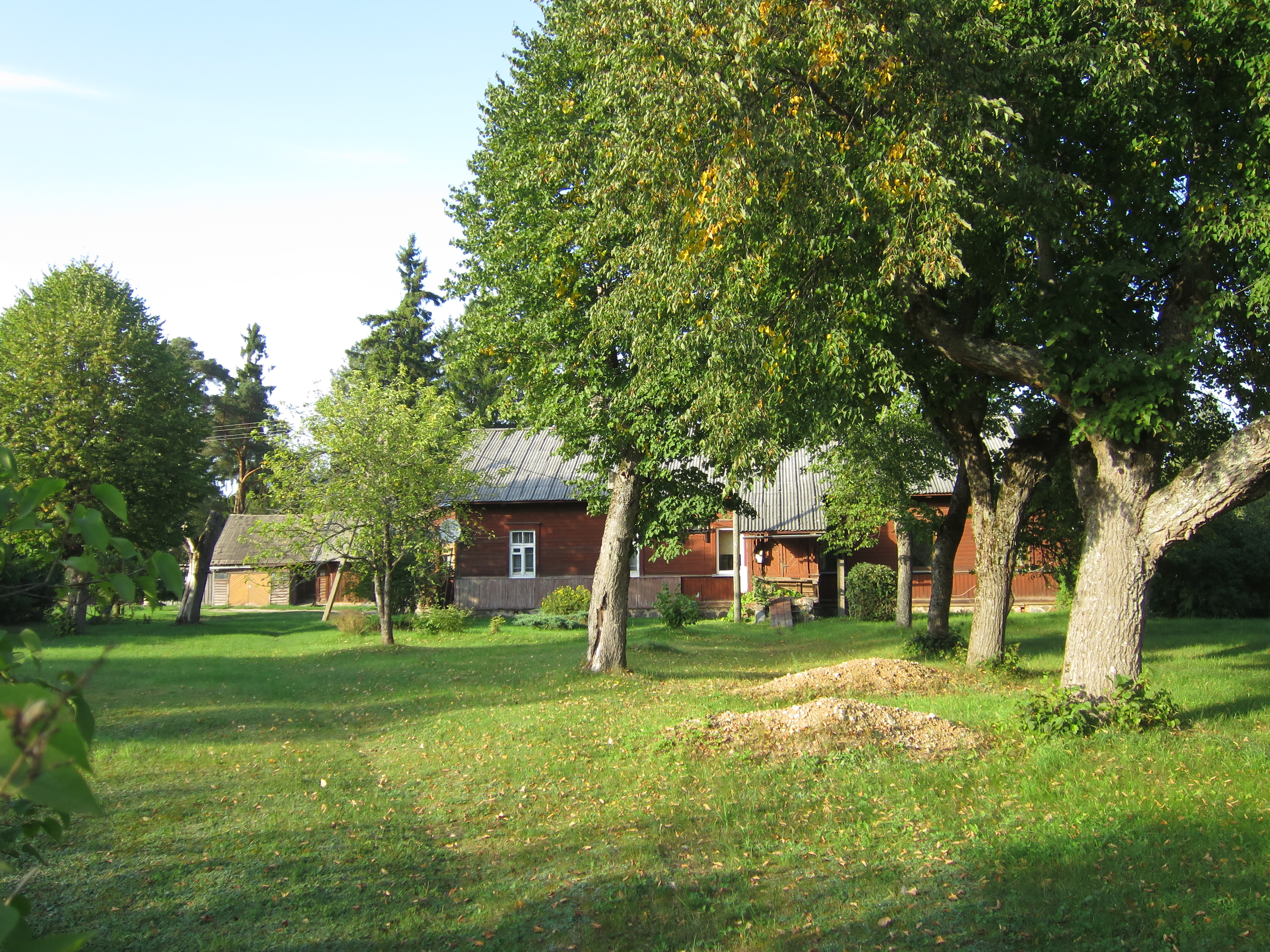 Piebalgas stacija